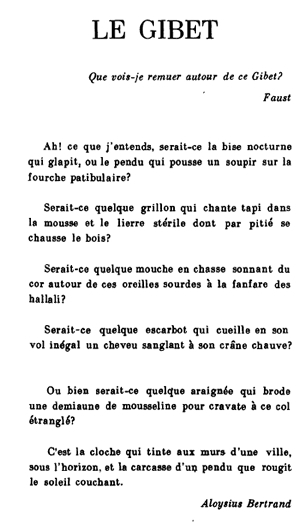 poem